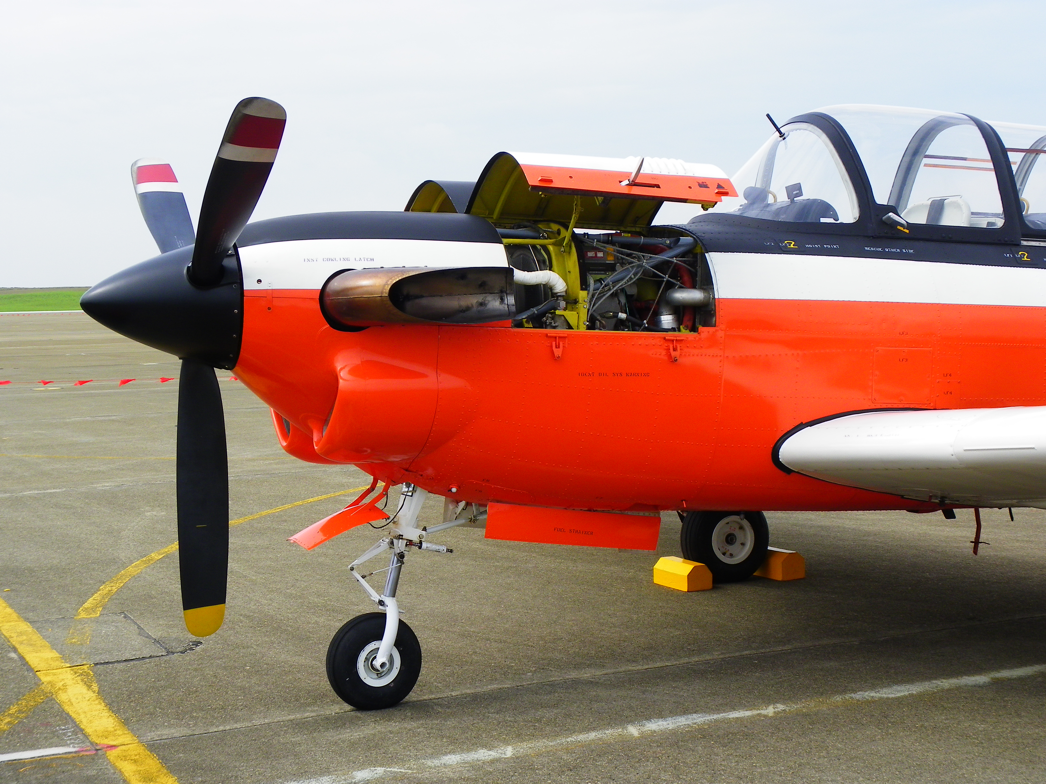 2011年空軍清泉崗基地營區開放活動，開啟引擎艙蓋的T-34C教練機機首。